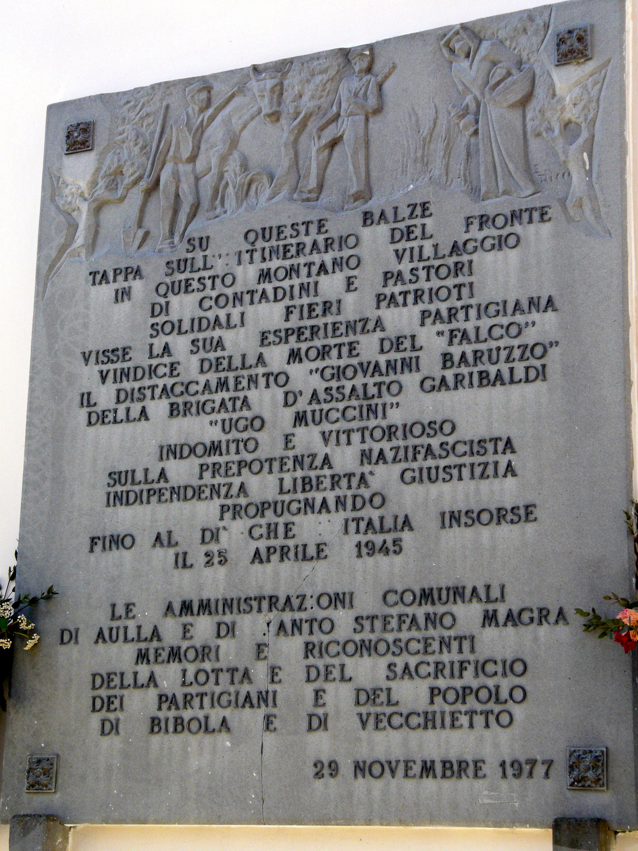 Targa dedicata alla partigiana Brigata d'assalto Garibaldi "Ugo Muccini", Vecchietto, Aulla, Toscana, Italia